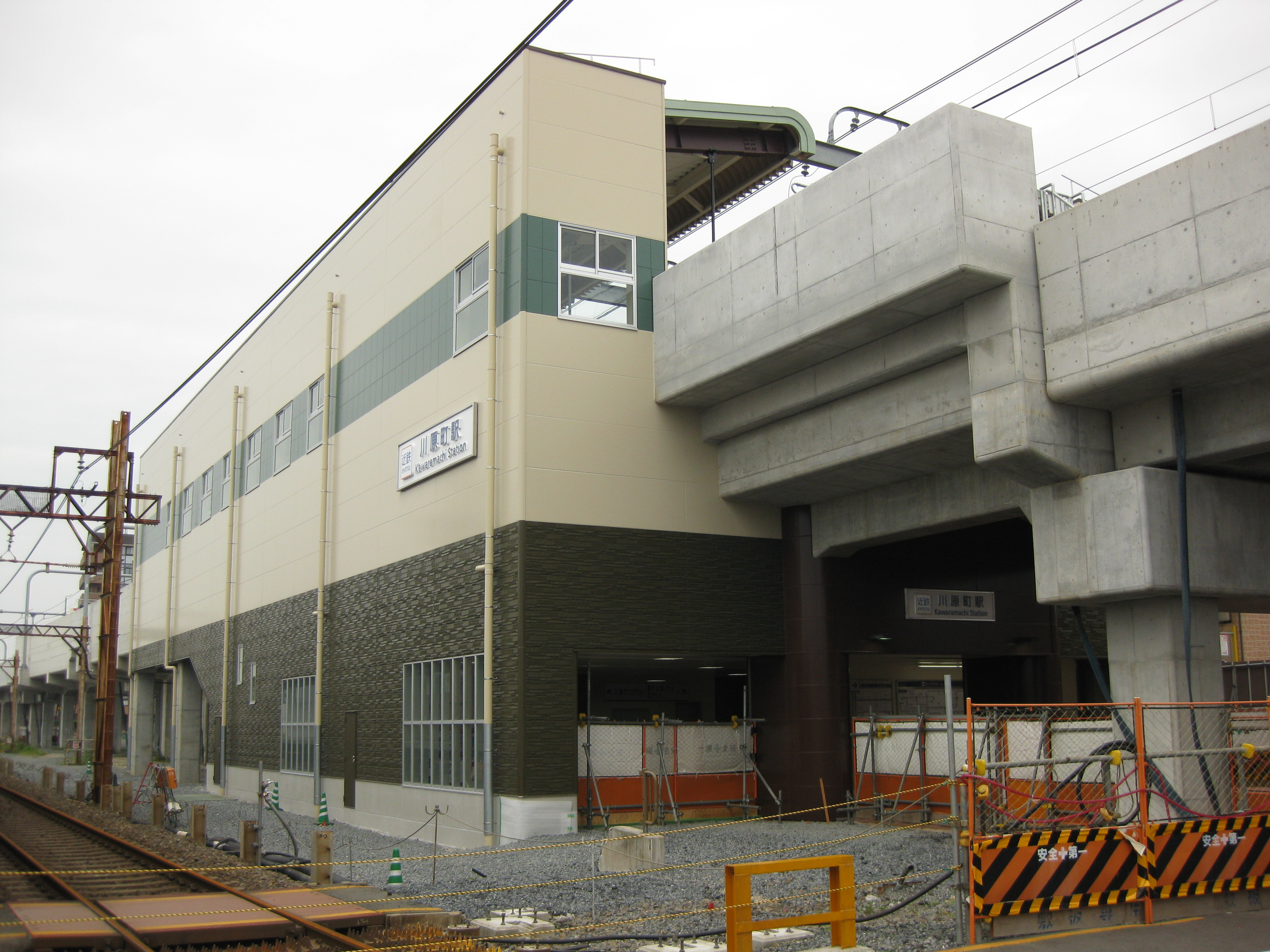 高架化後のja:川原町駅プラットホーム